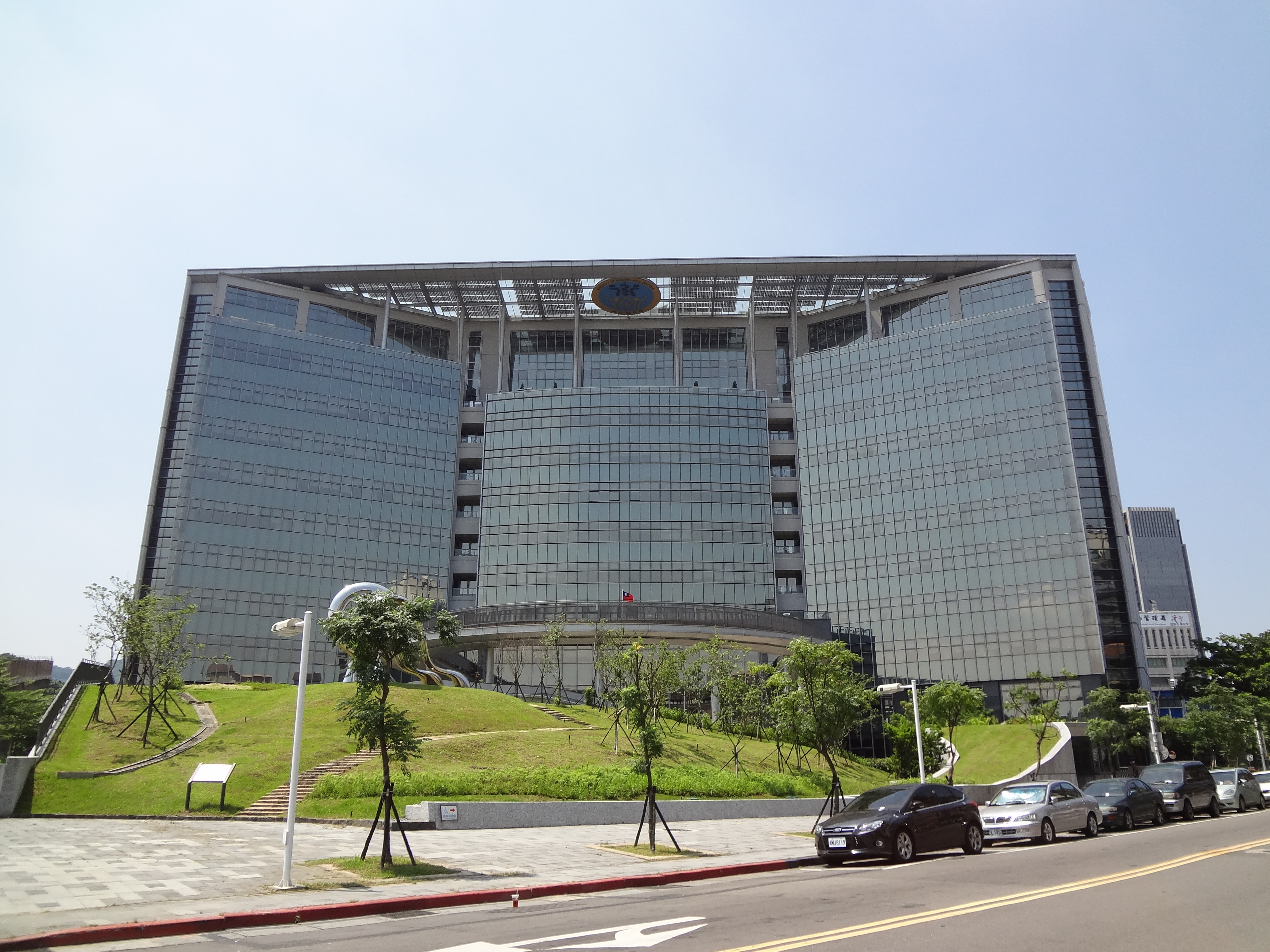 中華民國衛生福利部衛生福利大樓，位於臺北市南港區忠孝東路六段488號。